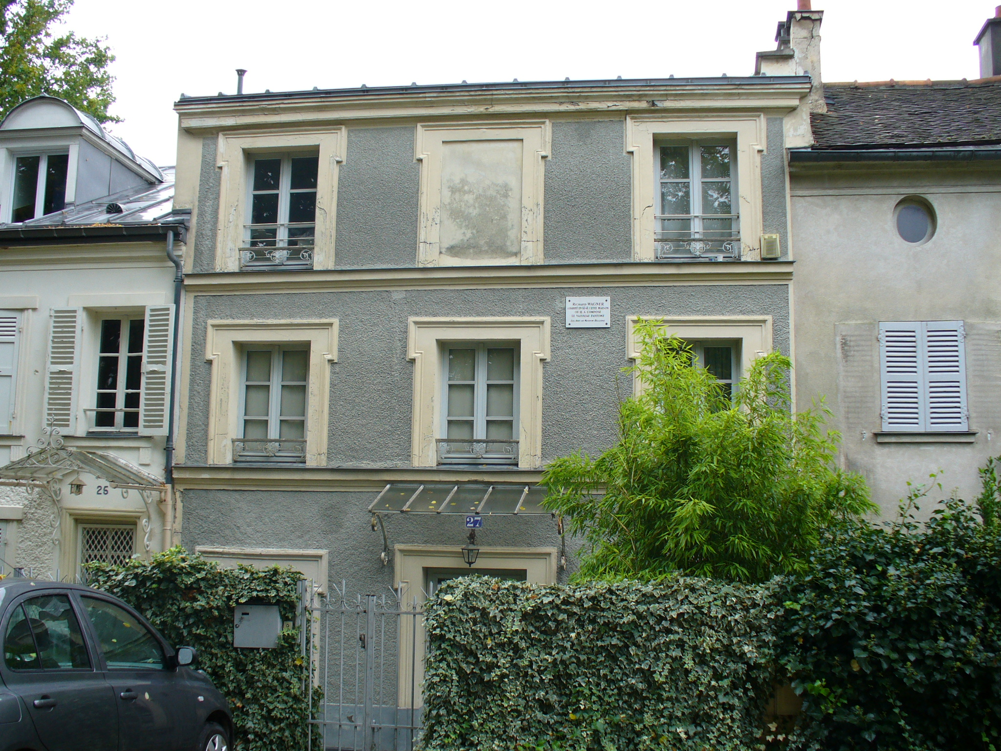 Maison de Richard Wagner à Meudon (Hauts-de-Seine)